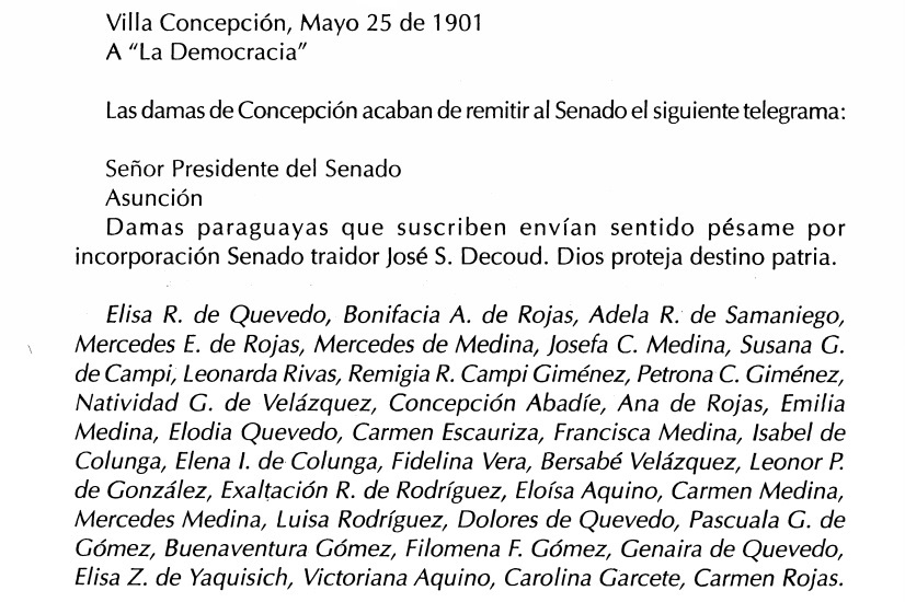 El telegrama enviado por Las Concepcioneras al Senado del Paraguay fue publicado en el diario La Democracia, el 25 de mayo de 1901.